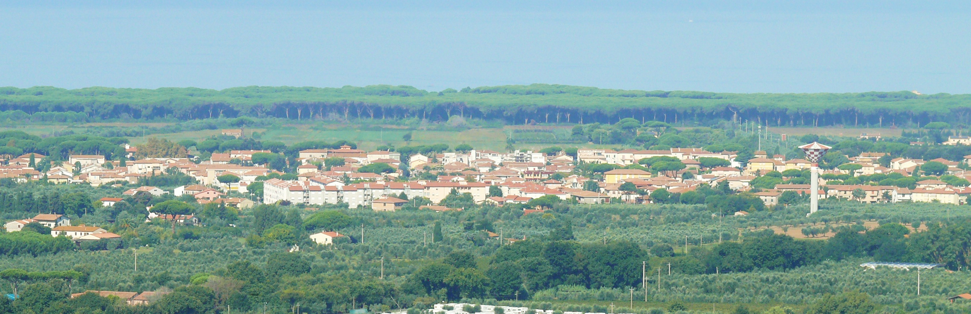 panorama di donoratico, toscana, italia